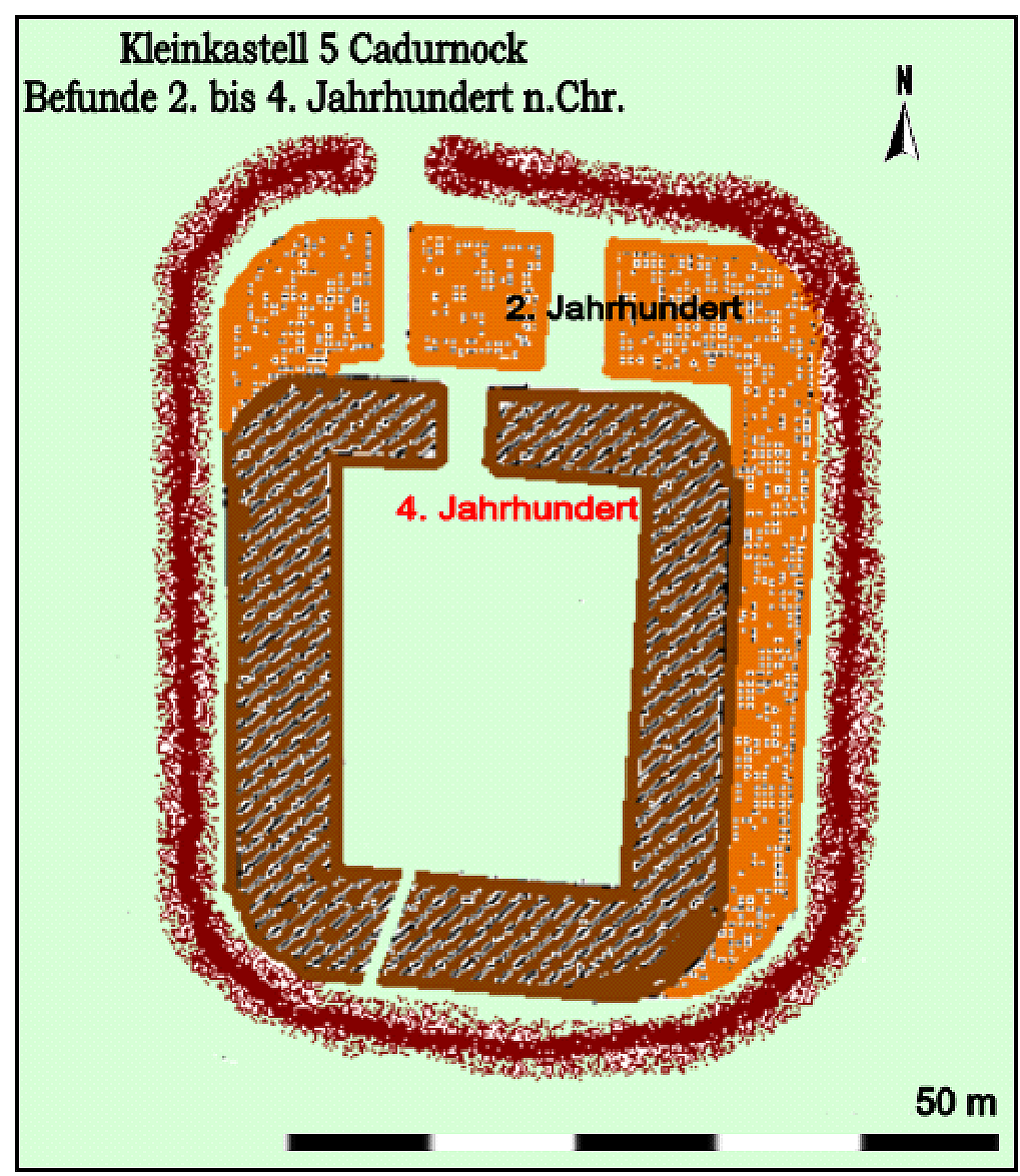 Befundskizze des römischen Kleinkastells 5, Cadurnock an der Westküste von Cumbria, 2. bis 4. Jahrhundert n.Chr.